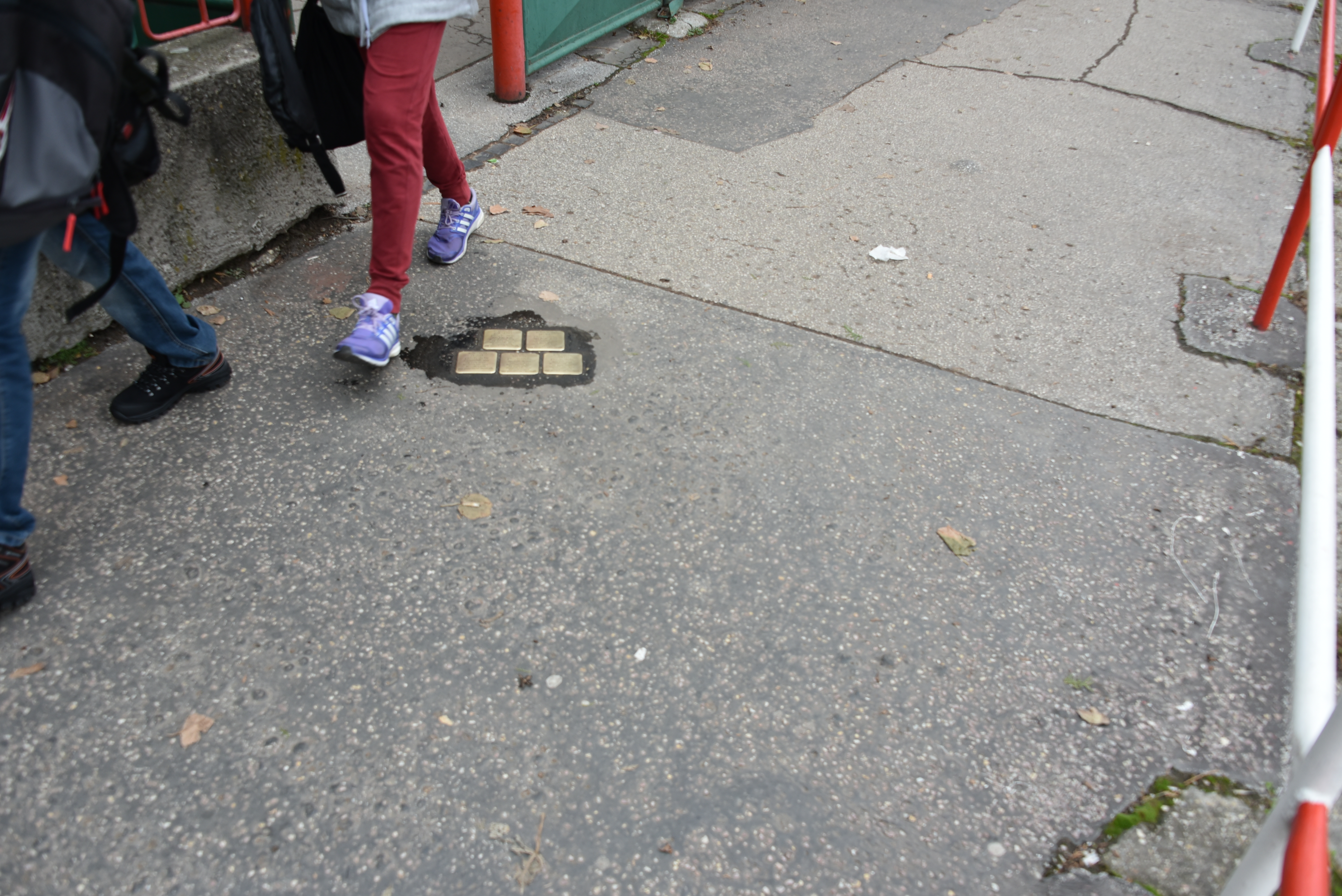 Stolpersteine in Komarno